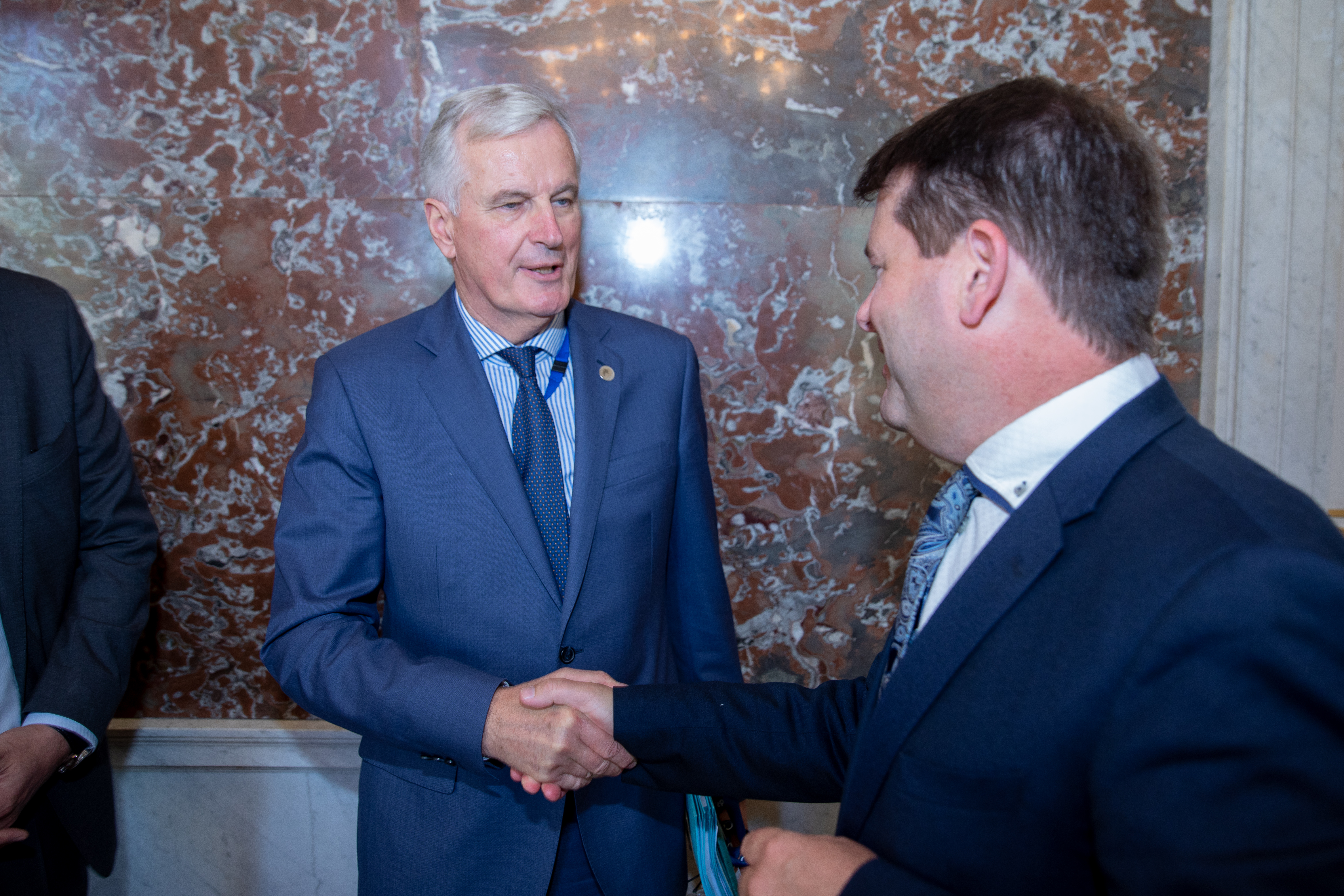 EPP Summit, Brussels, June 2018